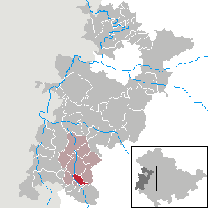 Neidhartshausen in Thuringia - Wartburgkreis